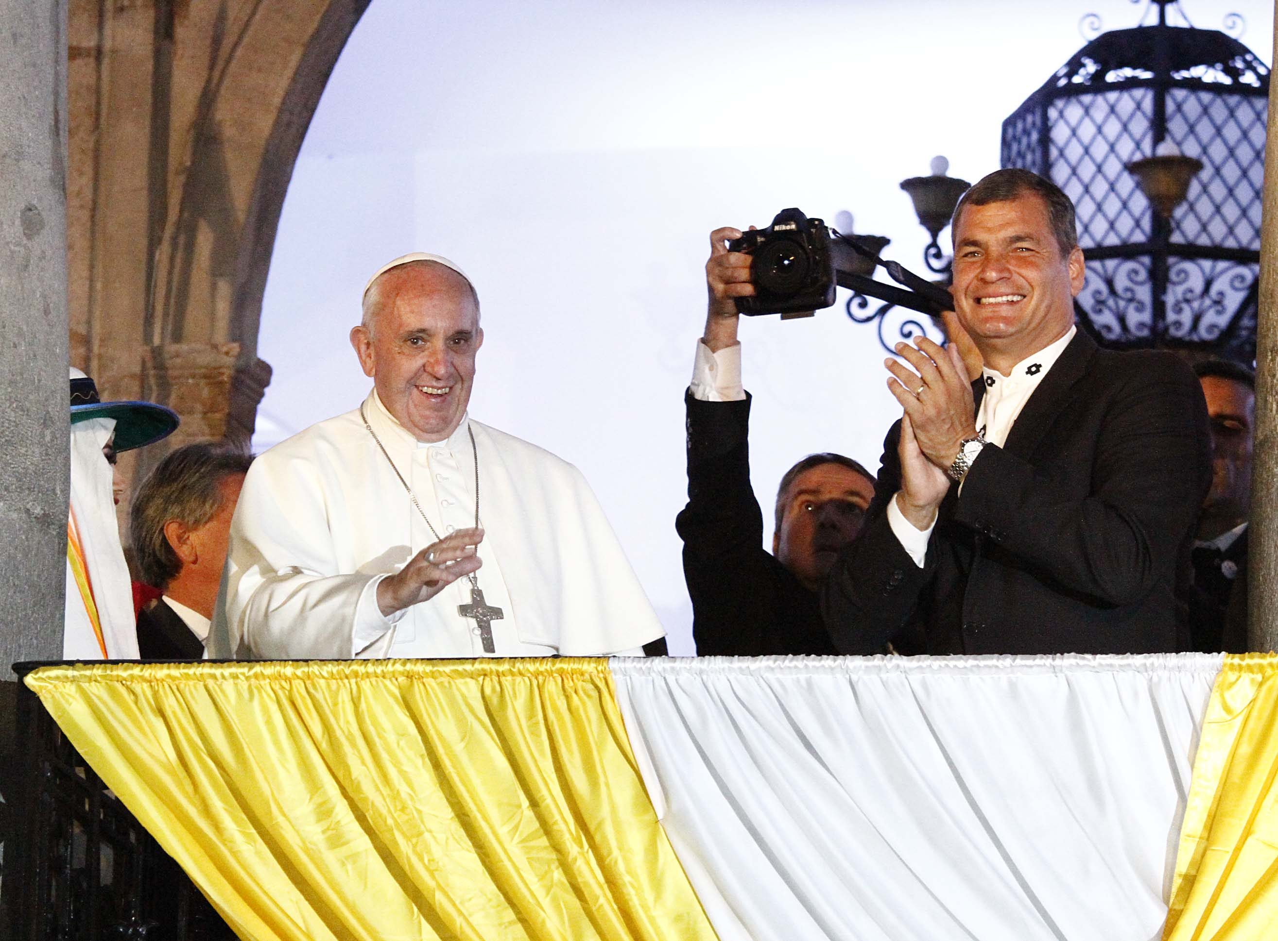 Quito, 06 jul (Andes).- El papa Francisco visitó el palacio de Carondelet donde mantuvo una reunión con el presidente de la República Rafael Correa. A su llegada se acercó al balcón para saludar y bendecir a los miles de fieles que se dieron cita en la Plaza Grande. ANDES/Micaela Ayala V.